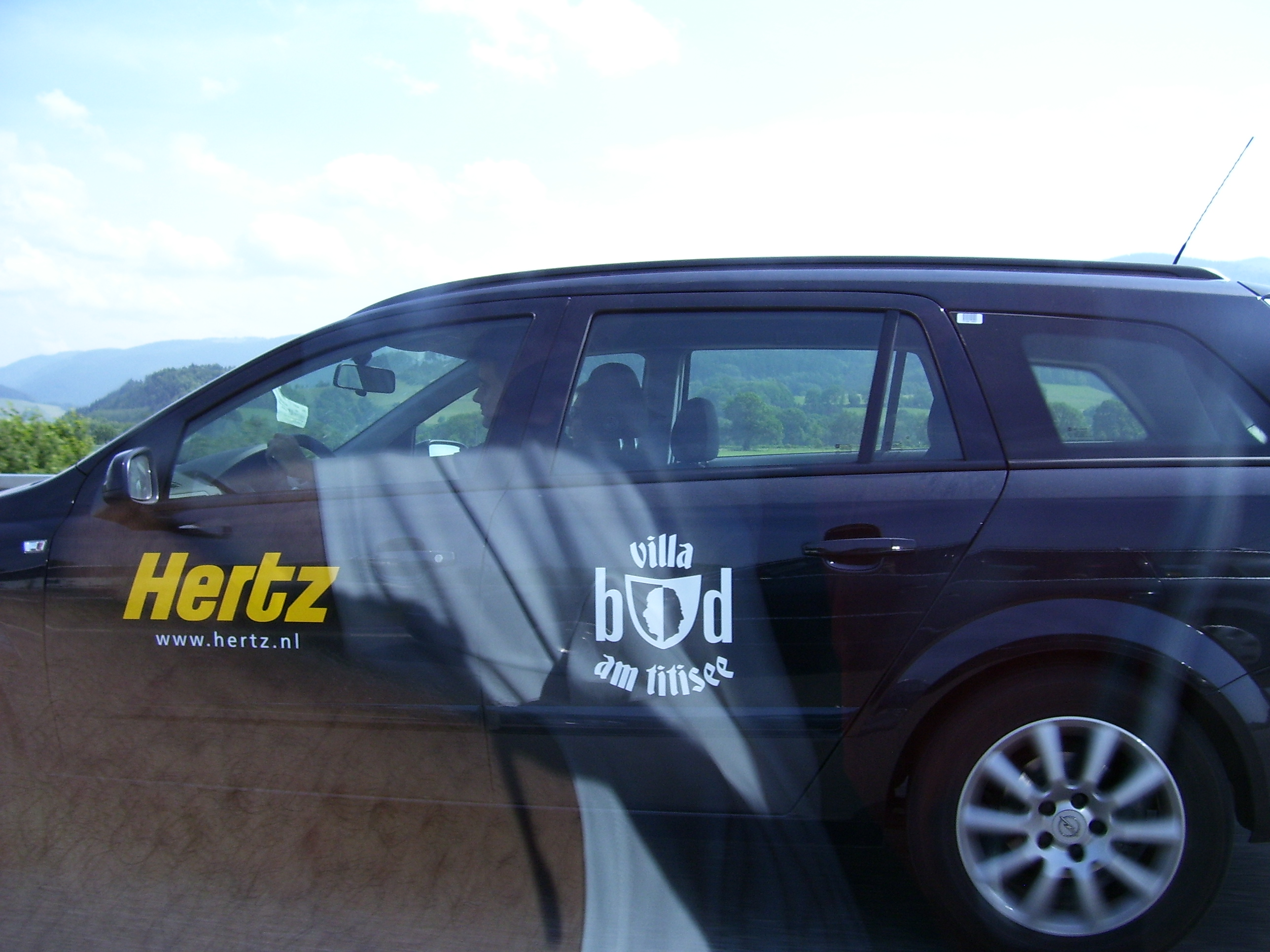 Eigen foto, gemaakt in juni 2006, auto met Wilfred Genee erin